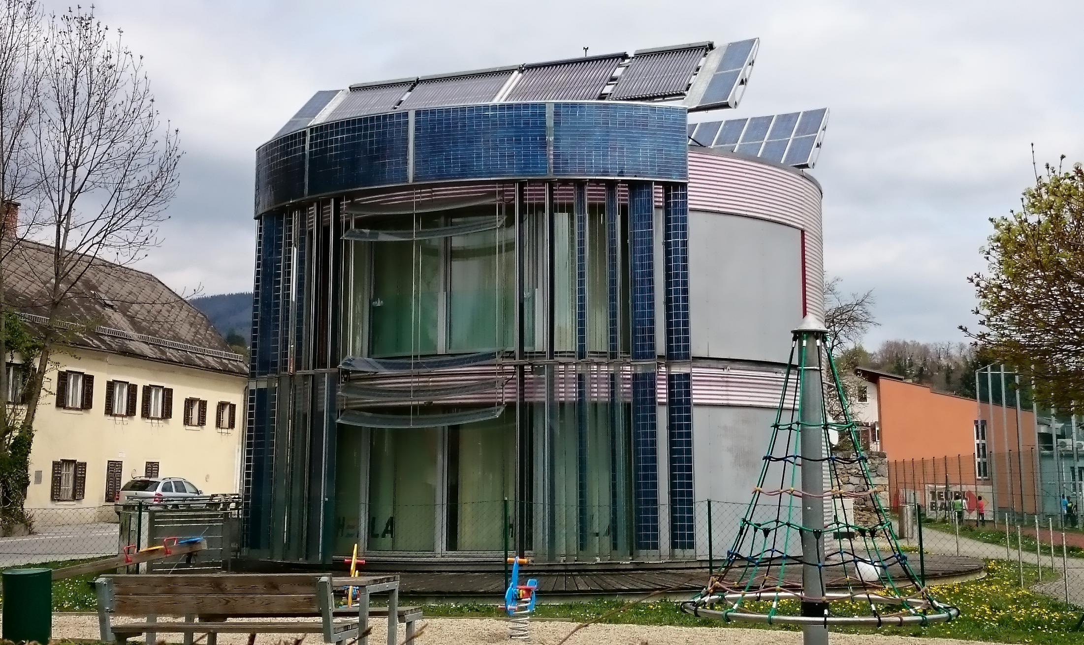 Das Geminihaus in Weiz im Frühling 2016 um 13:31